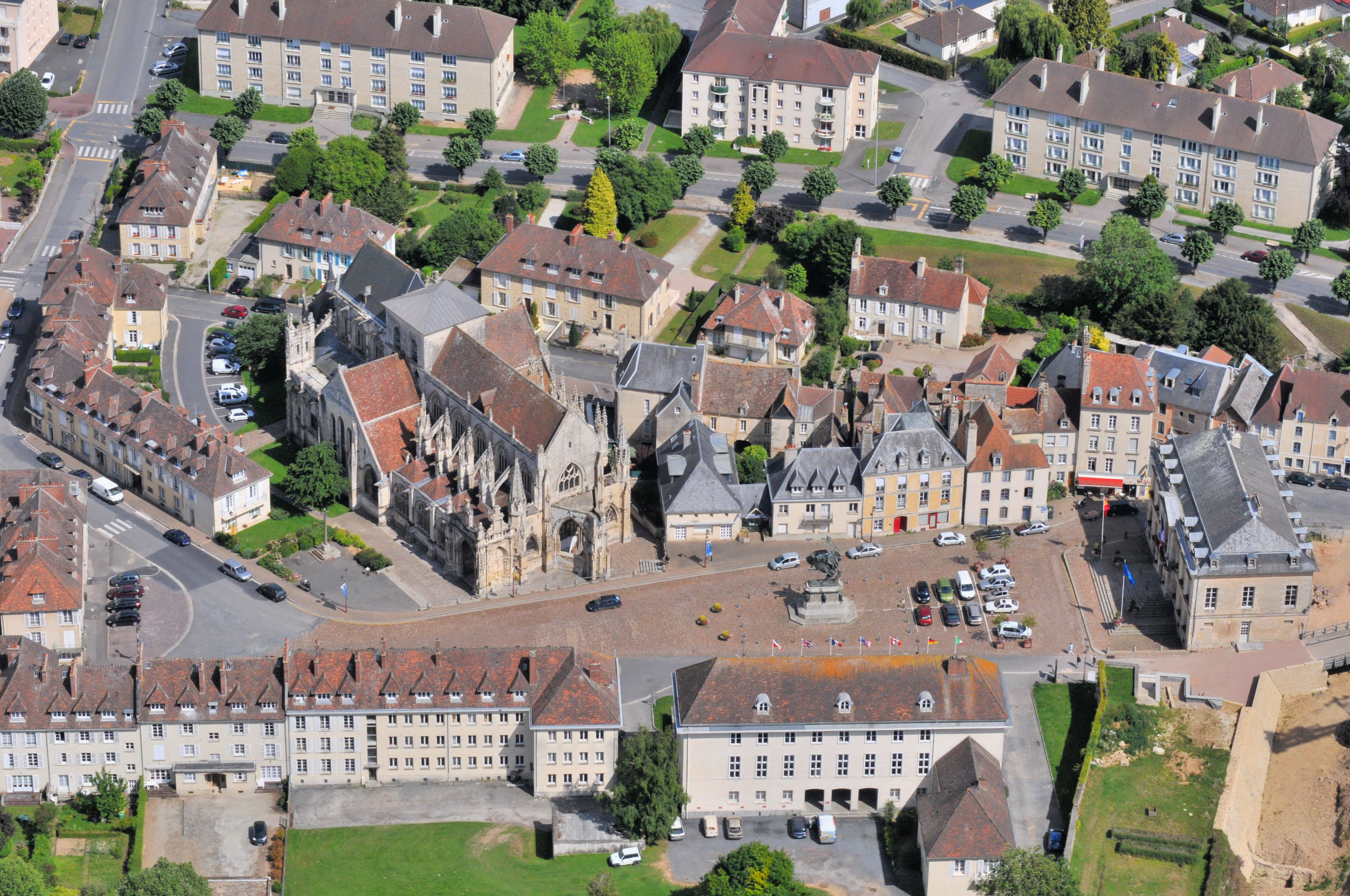 Eglise la trinite a falaise 4.JPG falaise calvados 14700